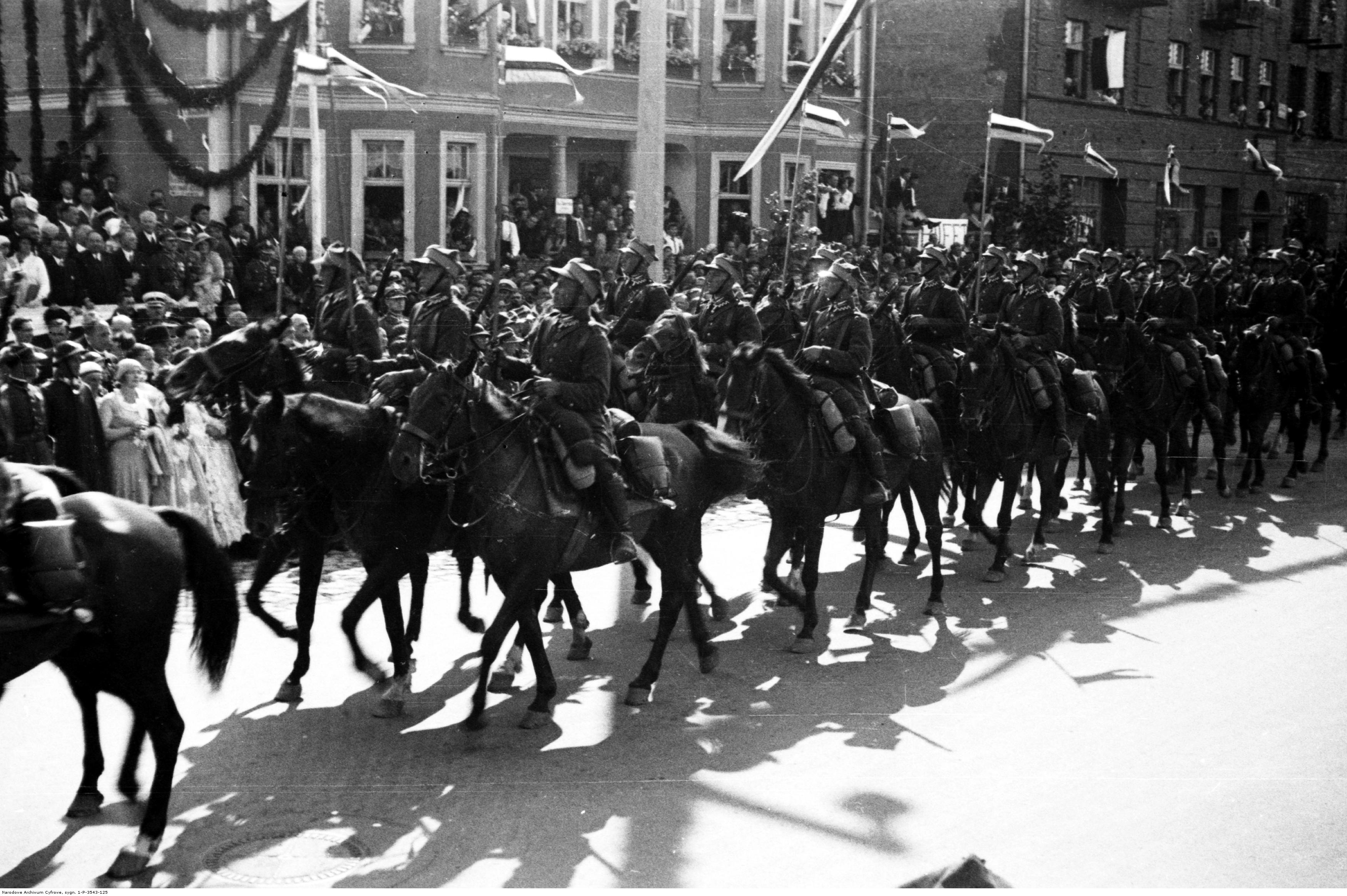 Obchody Święta Morza w Gdyni. Kawalerzyści z 18 Pułku Ułanów Pomorskich przed trybuną prezydenta RP Ignacego Mościckiego podczas defilady na ul. 10-go lutego. Koncern Ilustrowany Kurier Codzienny - Archiwum Ilustracji. Sygnatura: 1-P-3543-125